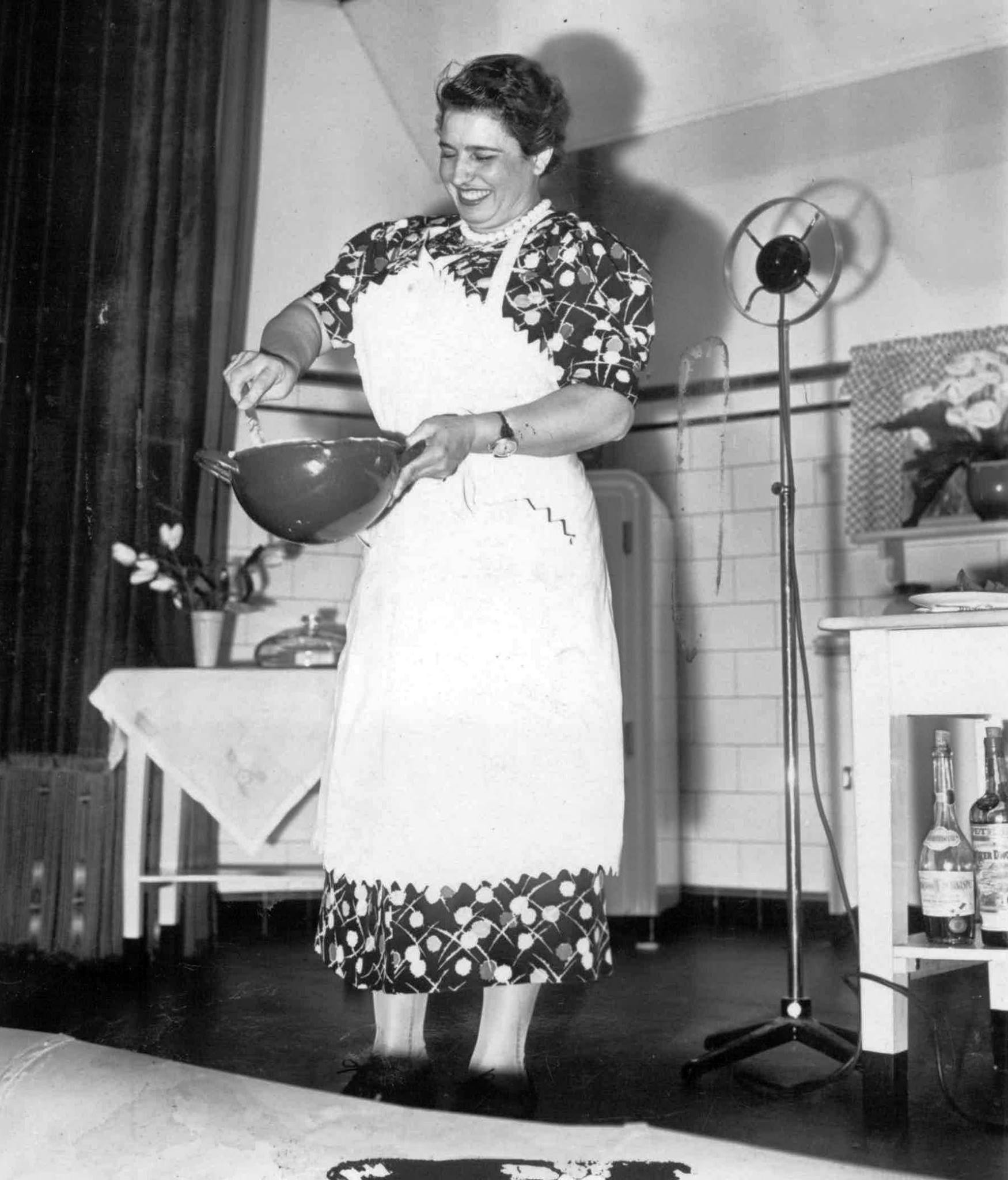 Clase de cocina por Doña Petrona C. de Gandulfo en el Salón Teatro de la Liga Católica, 1938.